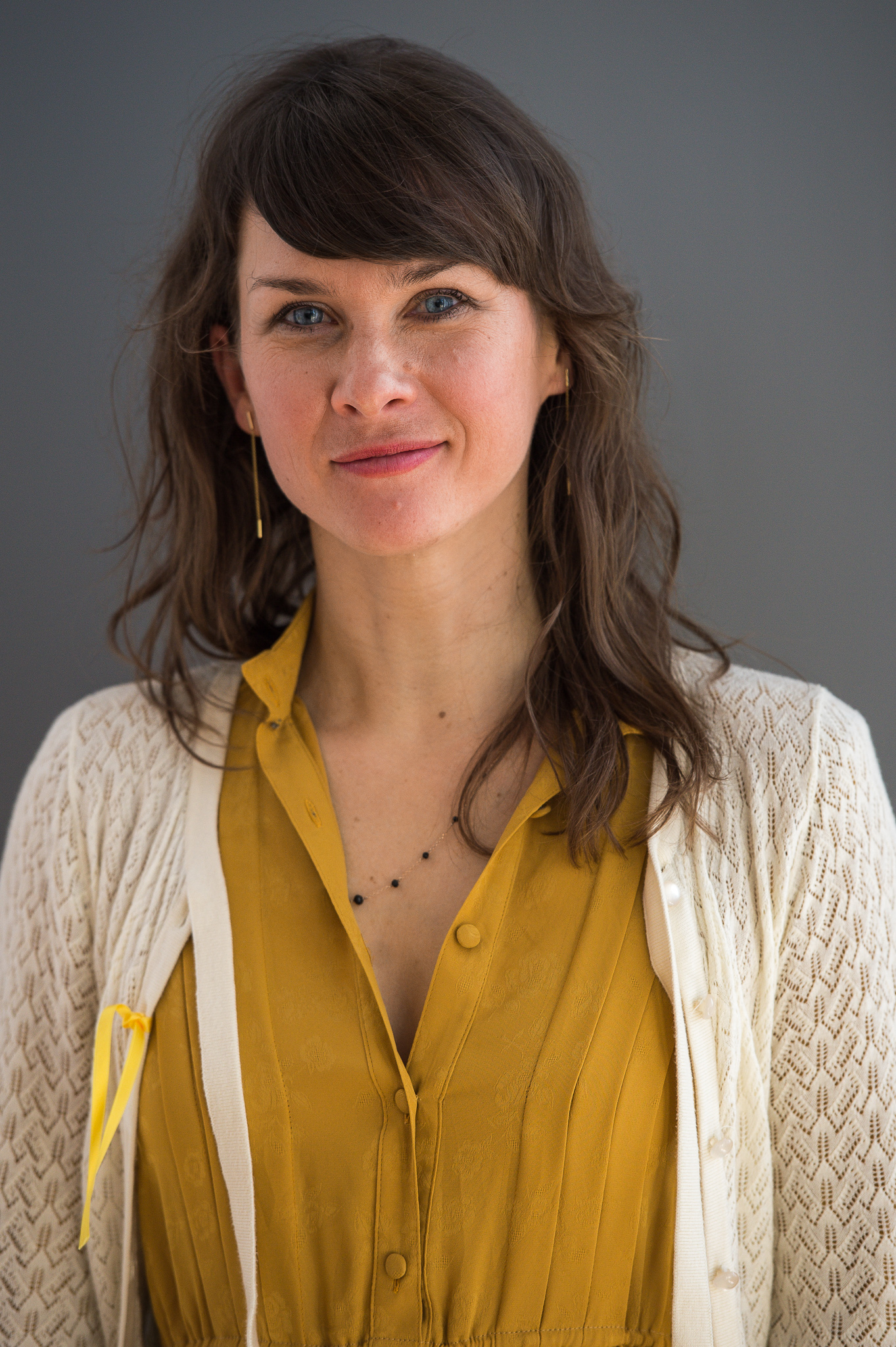 BR,Bayerischer Rundfunk,Bayerisches Fernsehen,Filmbrunch 2017,Kathrin von Steinburg